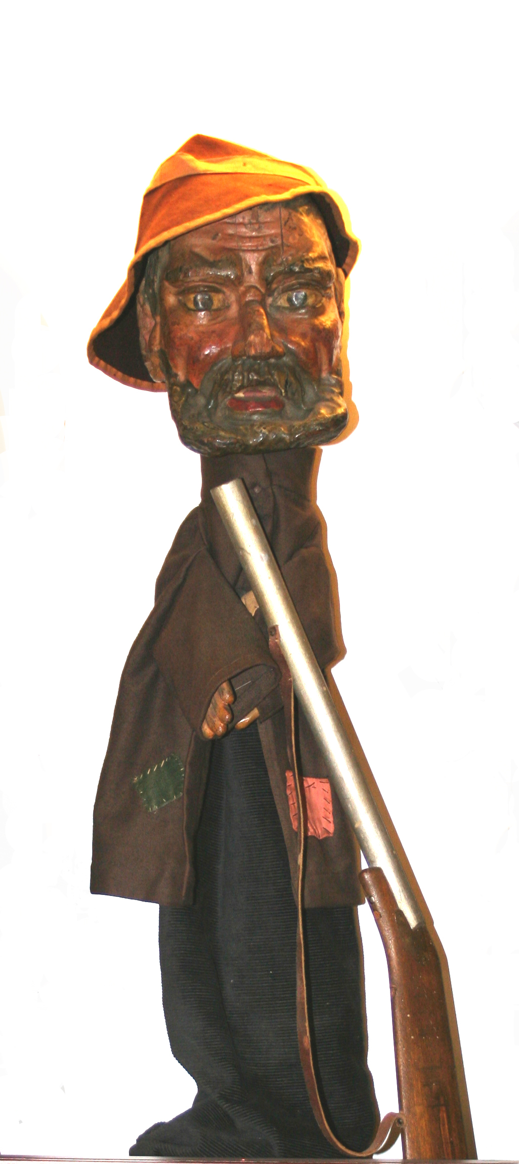 Autore Giorces. Carcino Carciofolì, maschera e burattino bergamasco.